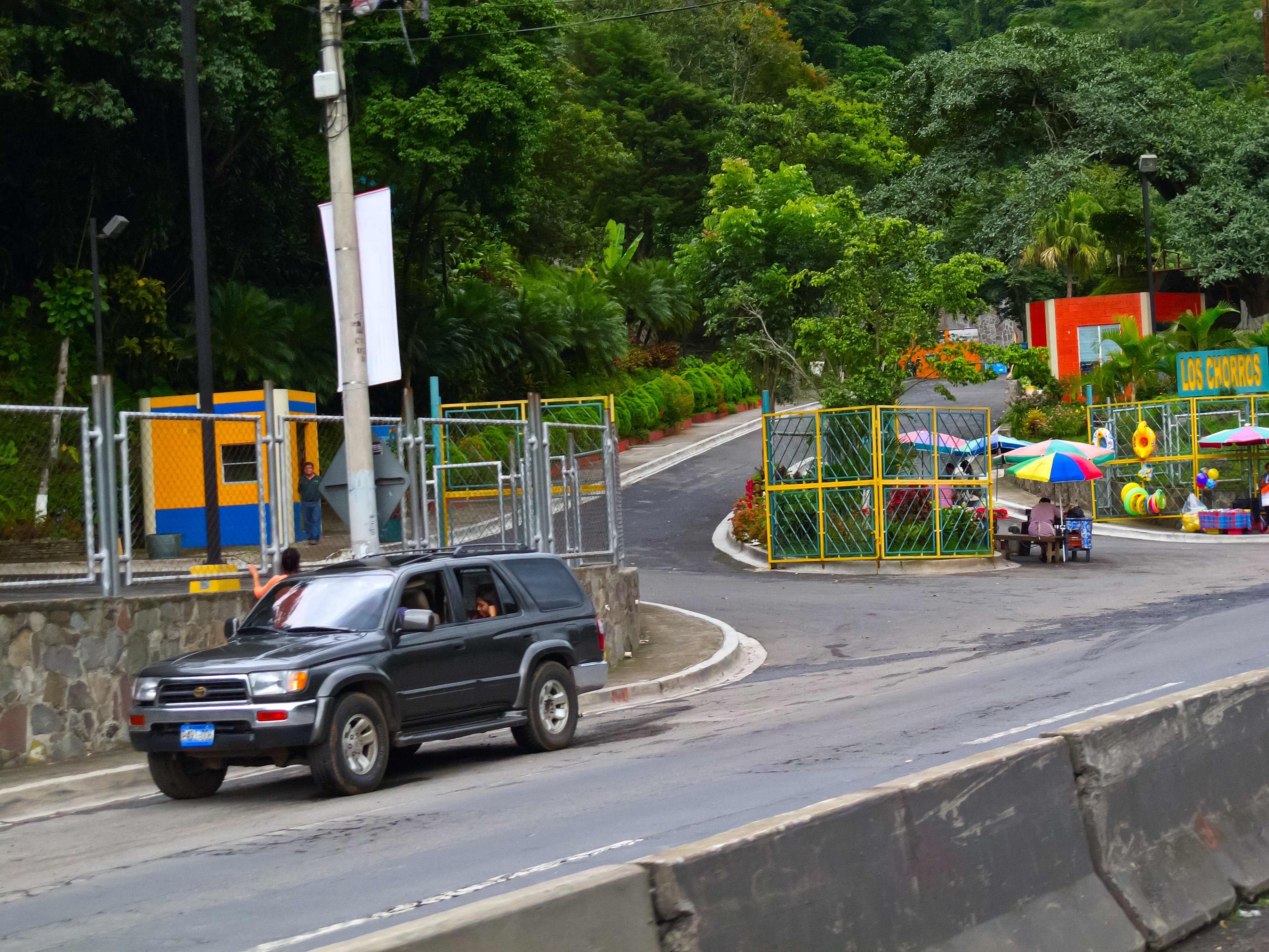 La entrada a los chorros desde la Carretera Panamericana, Colon, La Libertad, El Salvador